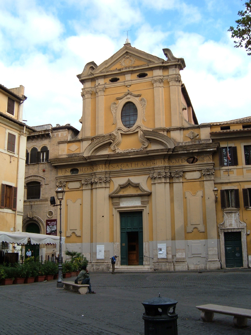 Eglise de Sainte Agathe, à Rome, dans le "rione Trastevere"